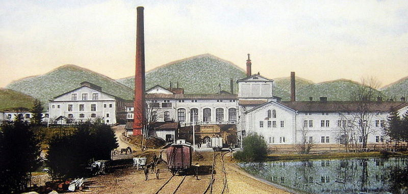 reprodukcja